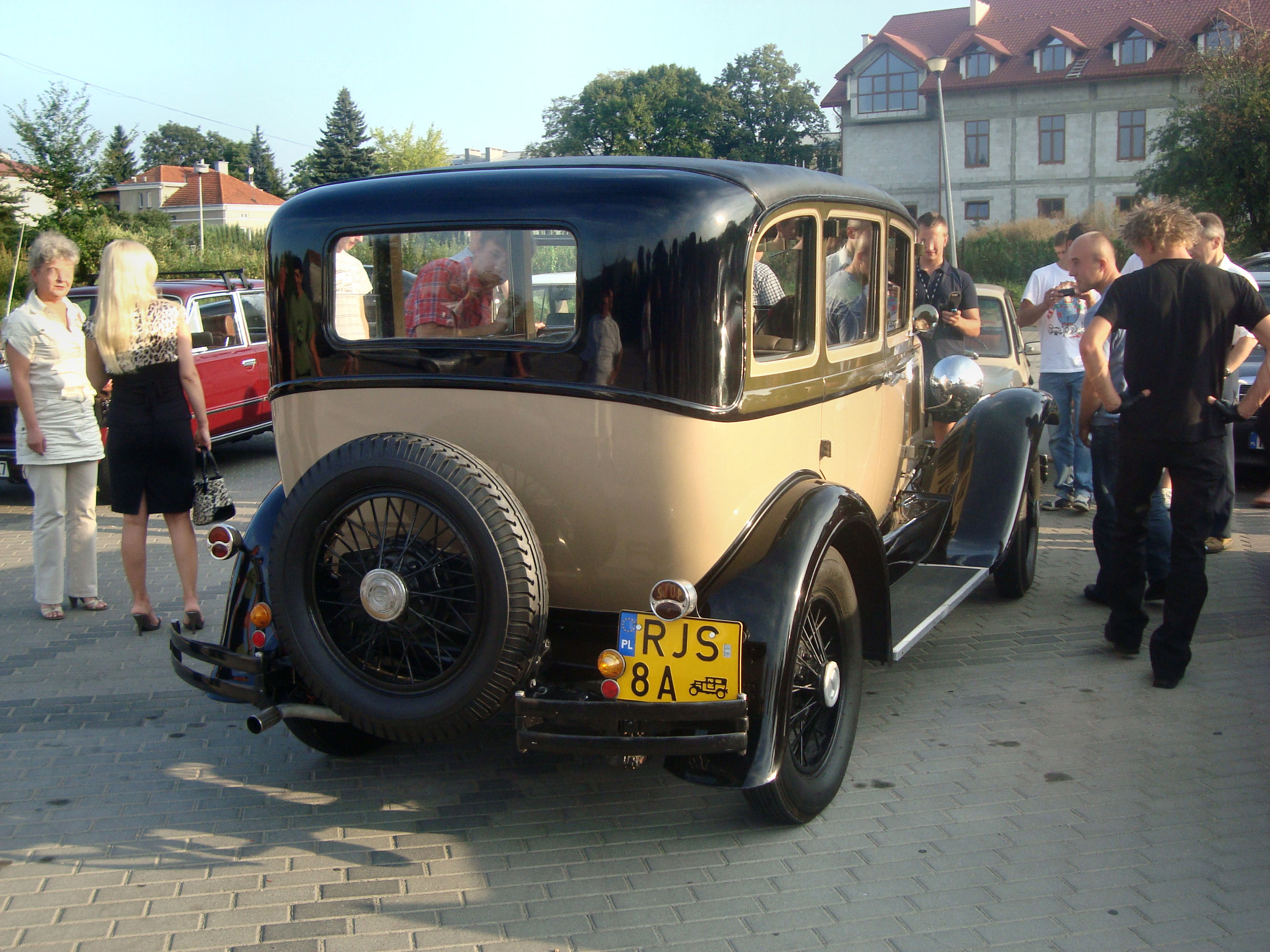 Studebaker z 1927 roku w Jaśle.